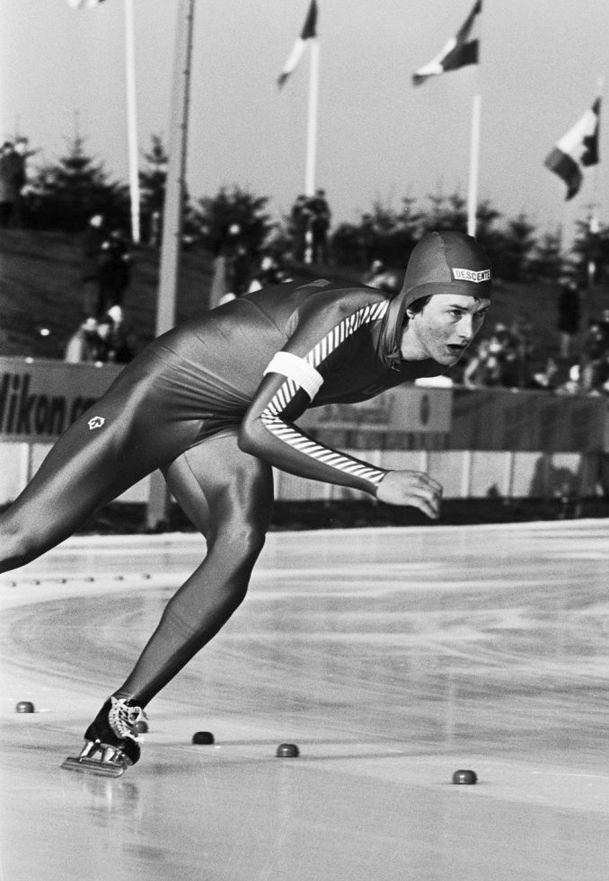 Wereldkampioenschappen schaatsen junioren allround in Assen. Craig Kressler (Verenigde Staten) in actie.